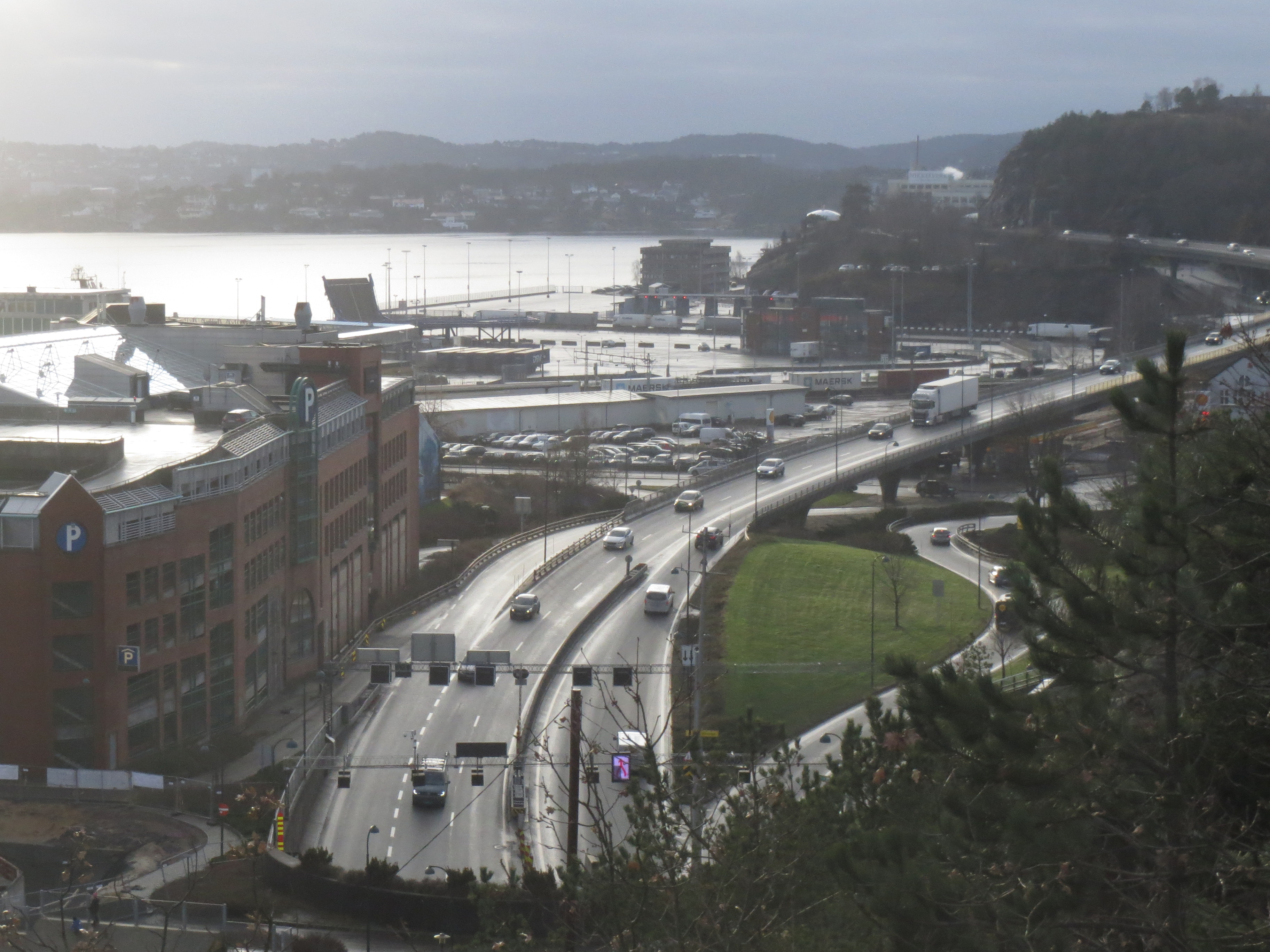 Overgangen fra E18 til E39, sett fra Baneheia